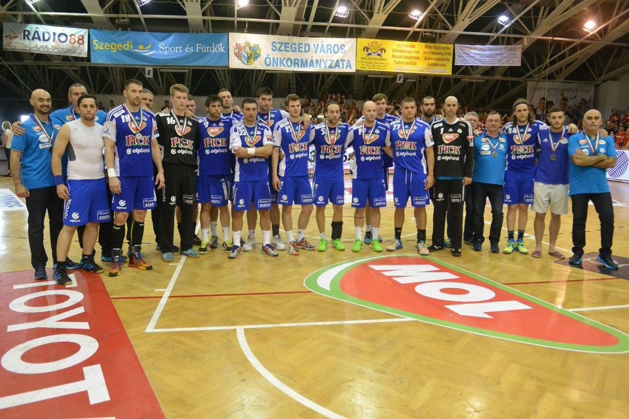 Pick Szeged kézilabda csapat a 2015-ös magyar bajnoki döntőn (Szeged, újszegedi sportcsarnok)